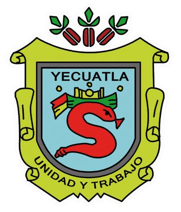 Escudo de Yecuatla Veracruz Mexico